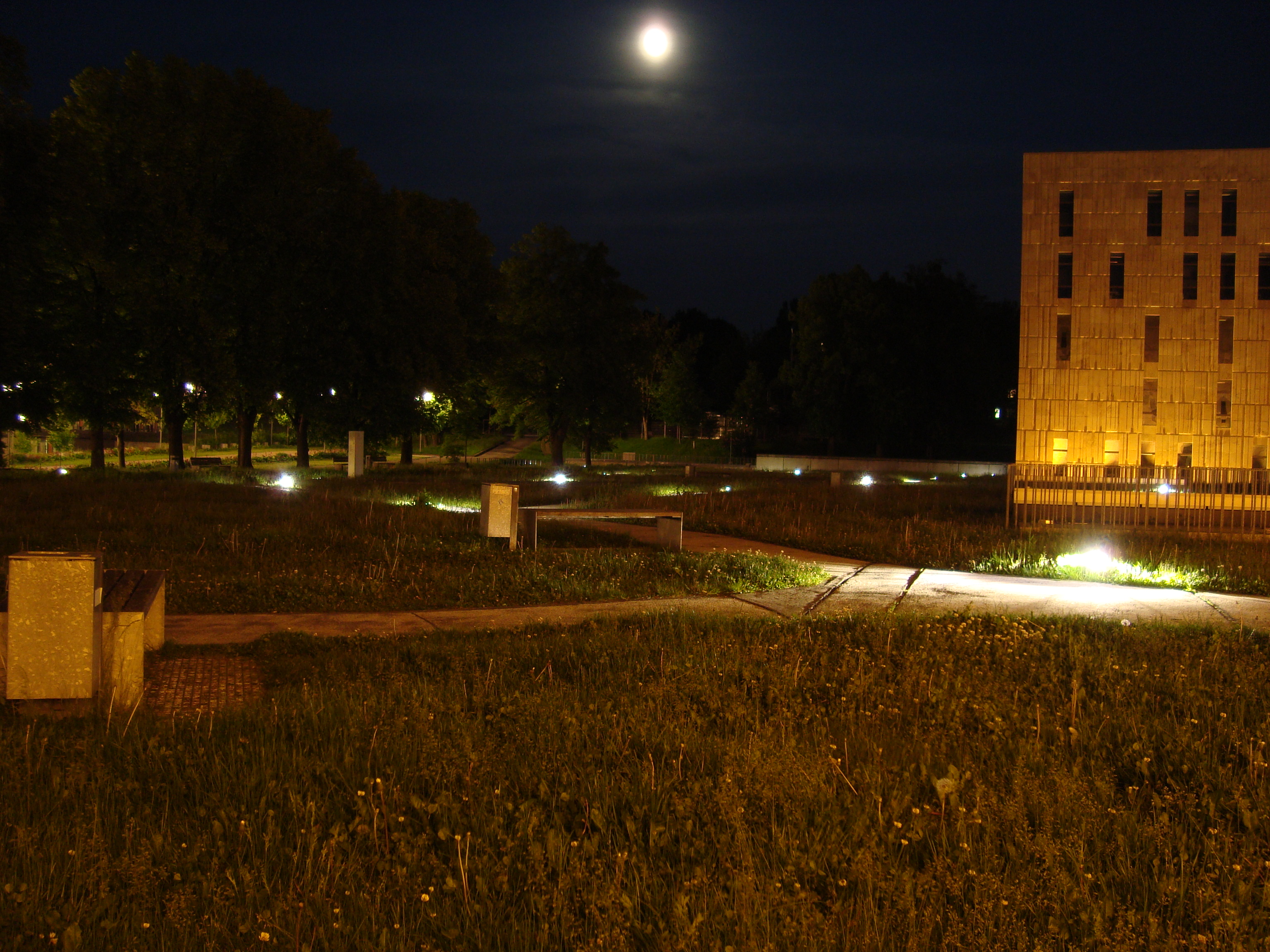 SLUB Dresden exterior at night (Zentralpunkt Zellescher WEG 18/ Central-Point Zellescher WEG 18).